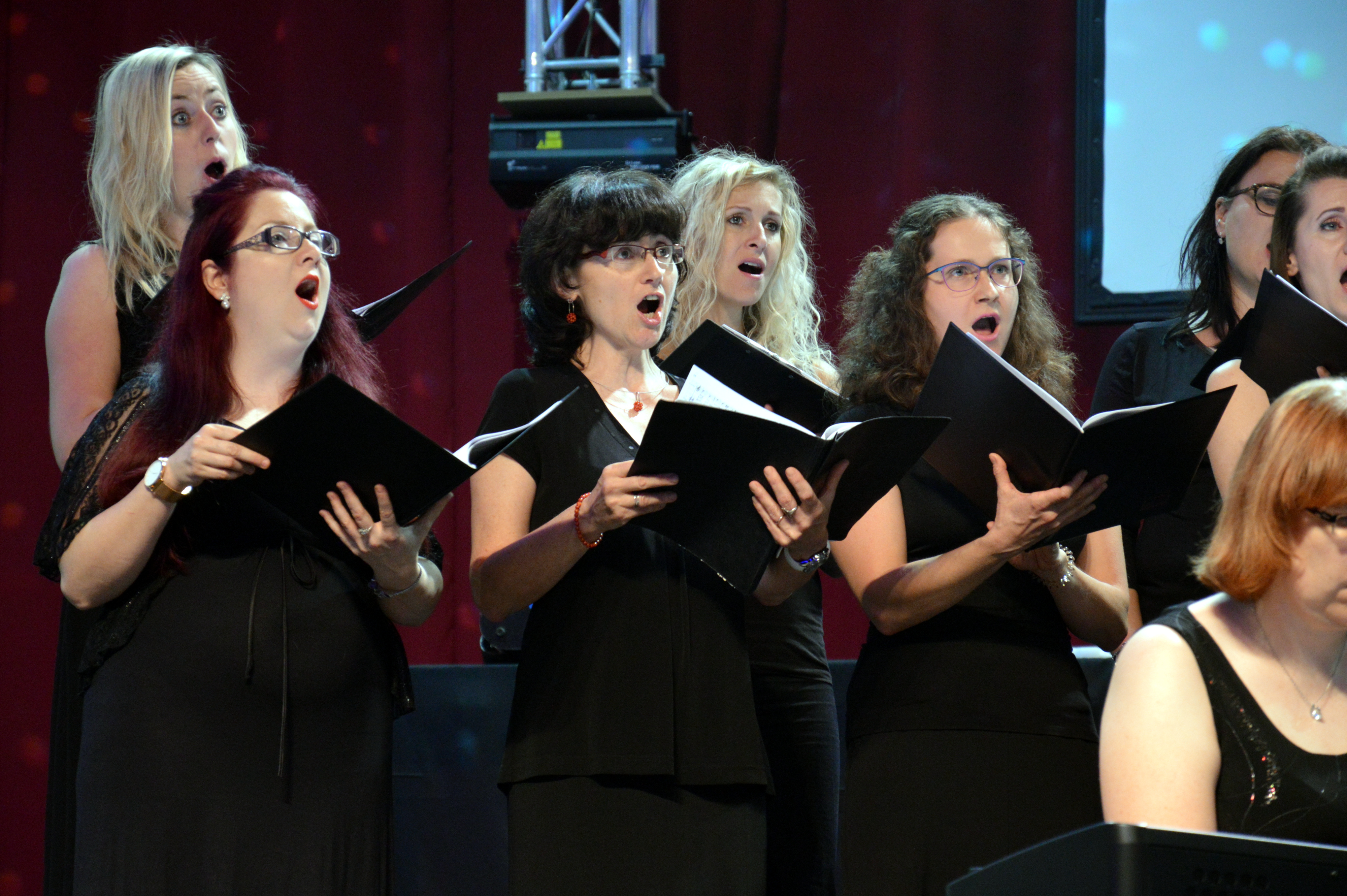 Sbor Ars Brunensis na slavnostním koncertě 100 let republika 20.10.2018 v Brně